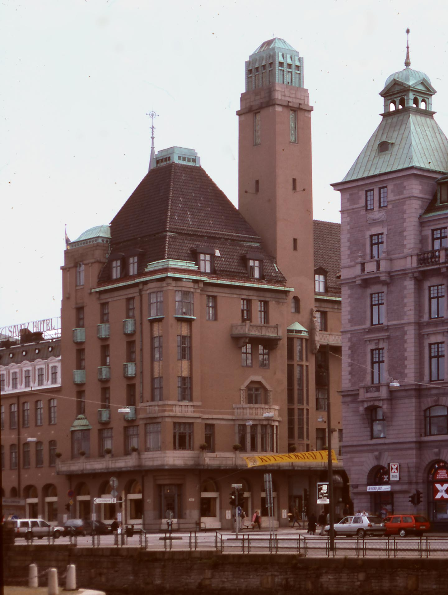 Savoy Hotel in Malmö, Sweden.